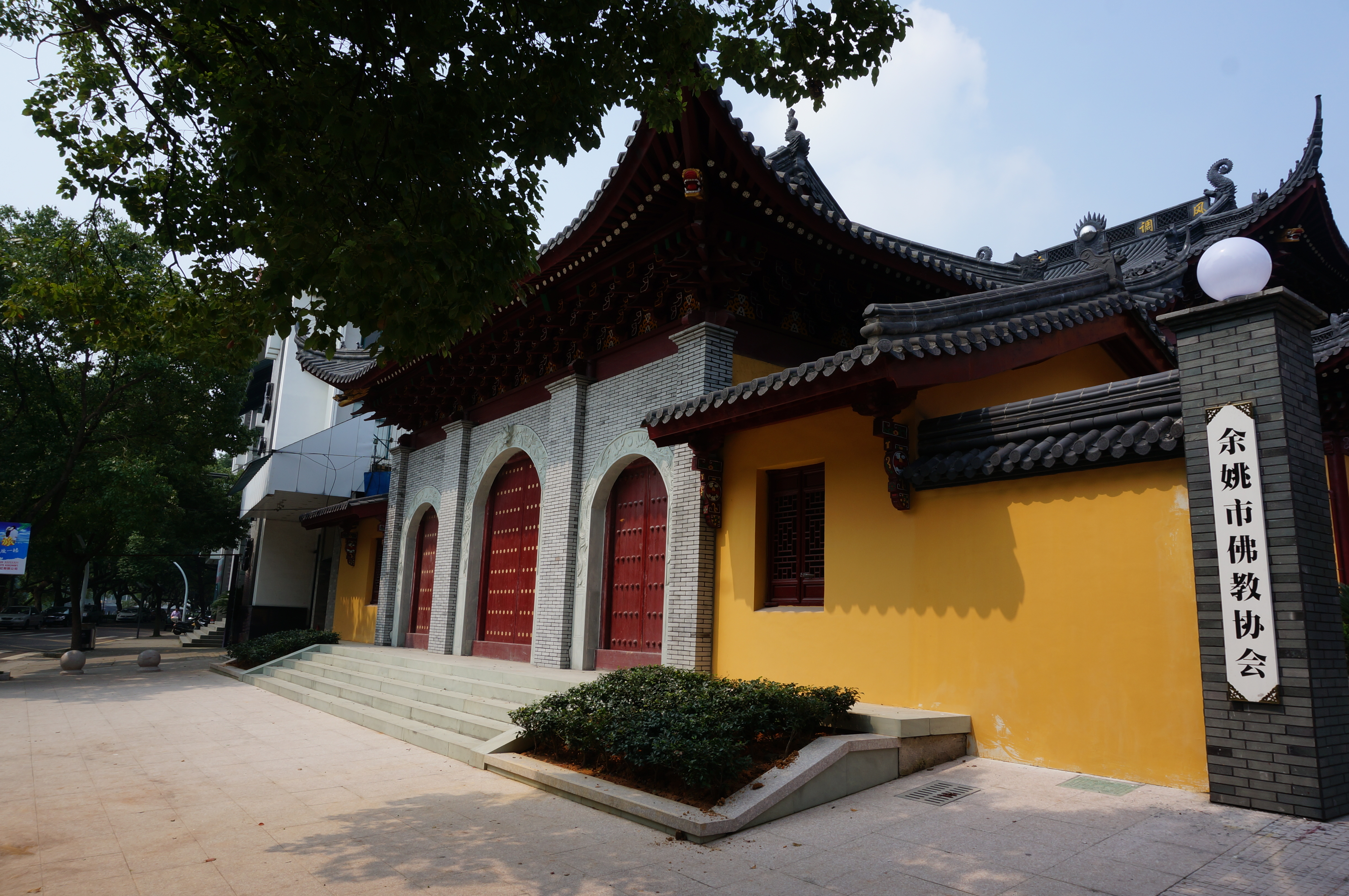 余姚龙泉寺，山门。